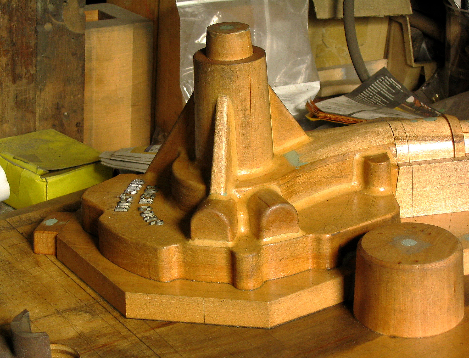 Form 7